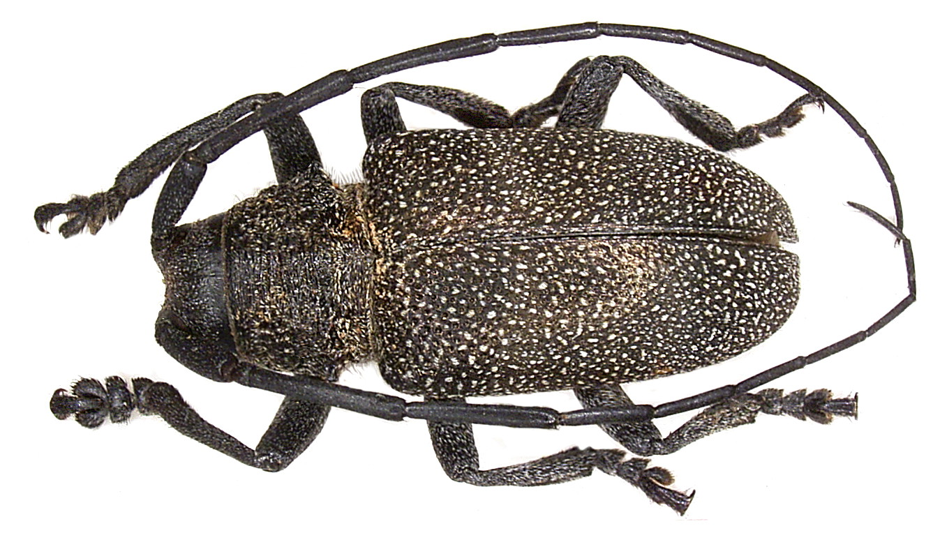 Familie: Cerambycidae Grösse: 19 mm Verbreitung: Angola, Botswana, Südafrika, Namibia Fundort: Namibia, Outjo leg.det. U.Schmidt, 1994 Foto: U.Schmidt, 2007